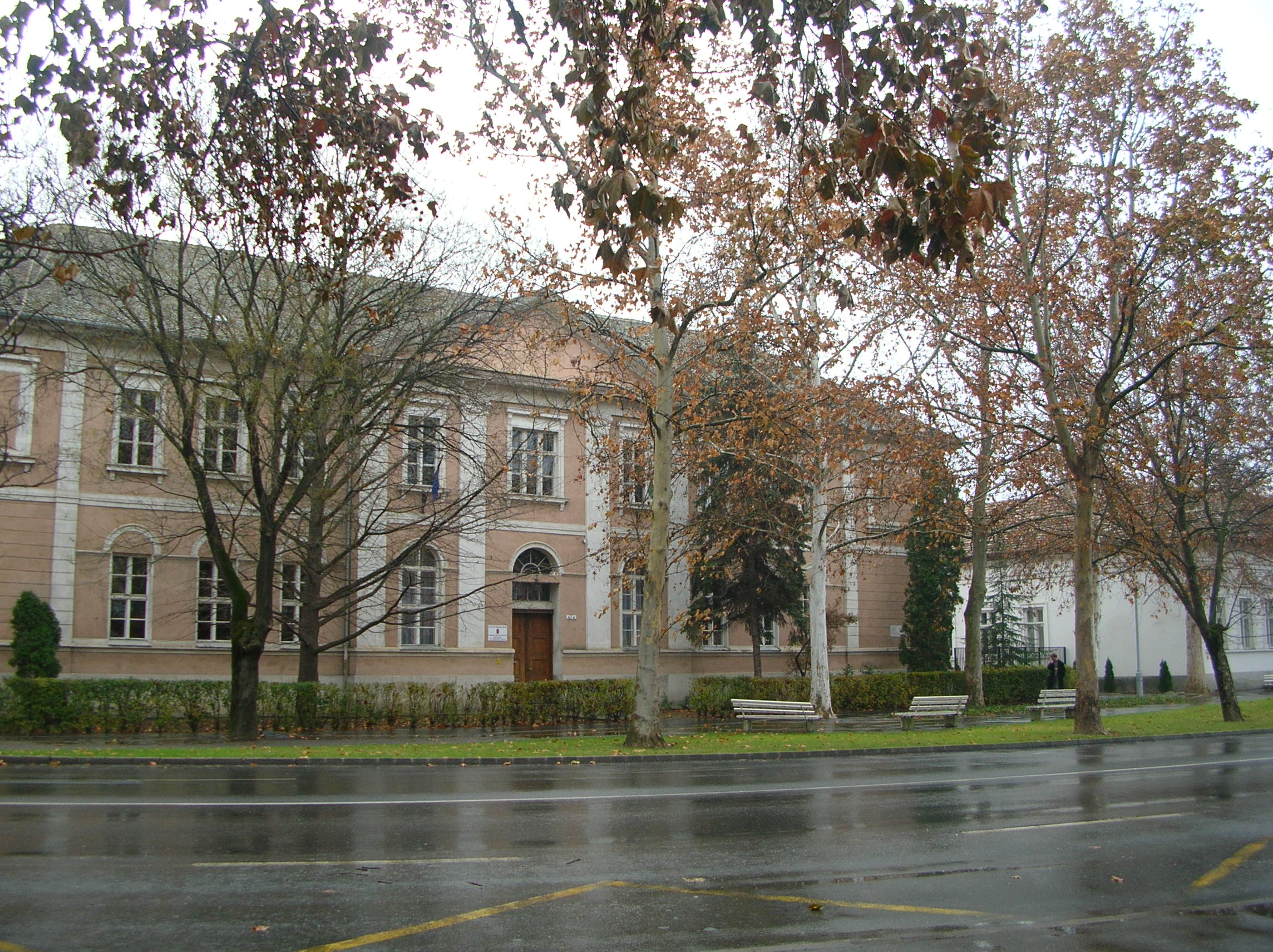 Makói Belvárosi Általános Iskola Alapfokú Művészetoktatási Intézmény és Logopédiai Intézet Bartók épülete